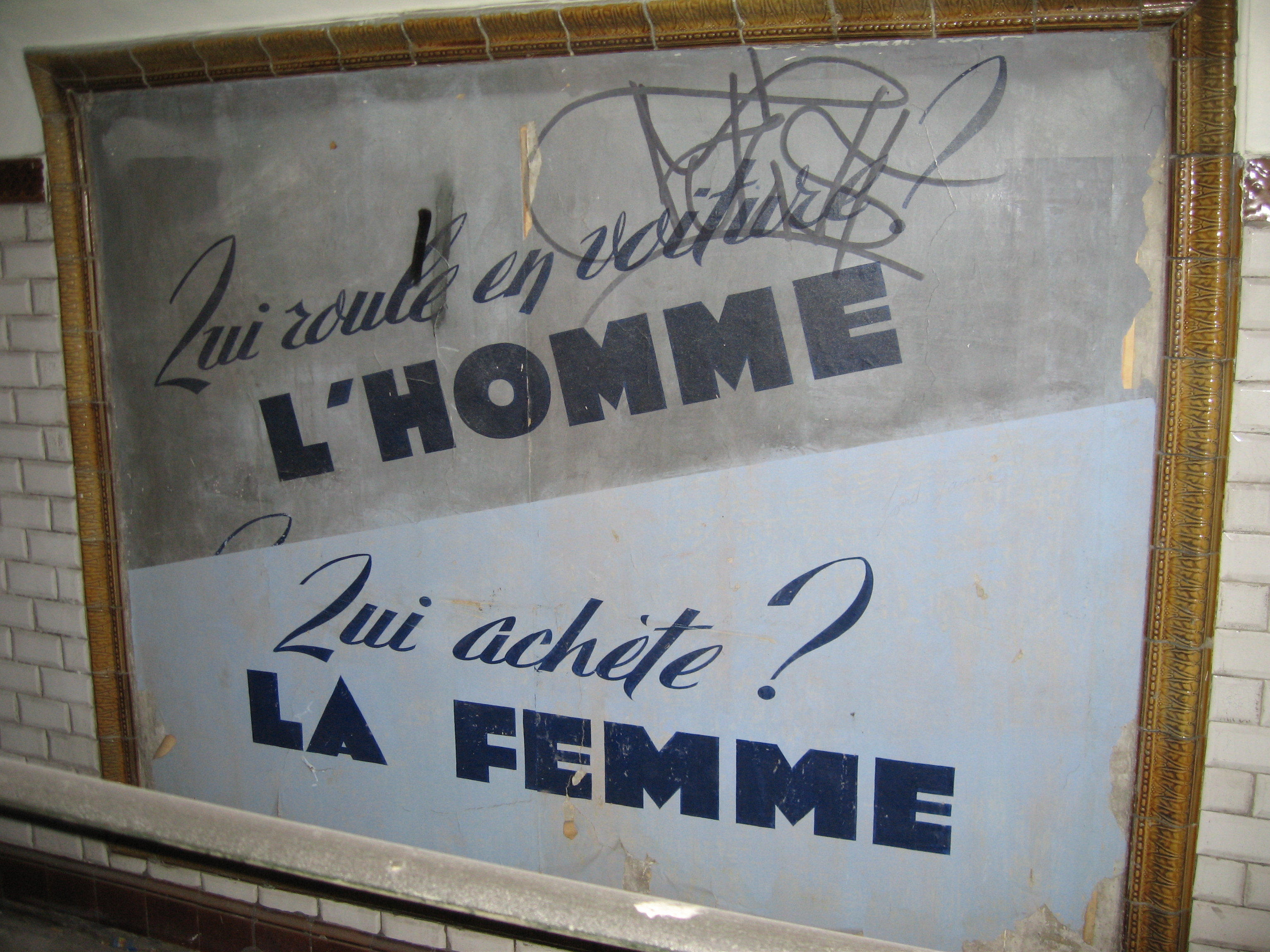 Journées du patrimoine RATP 16-17/09/2006. Publicité Homme-Femme à la station Saint-Martin.